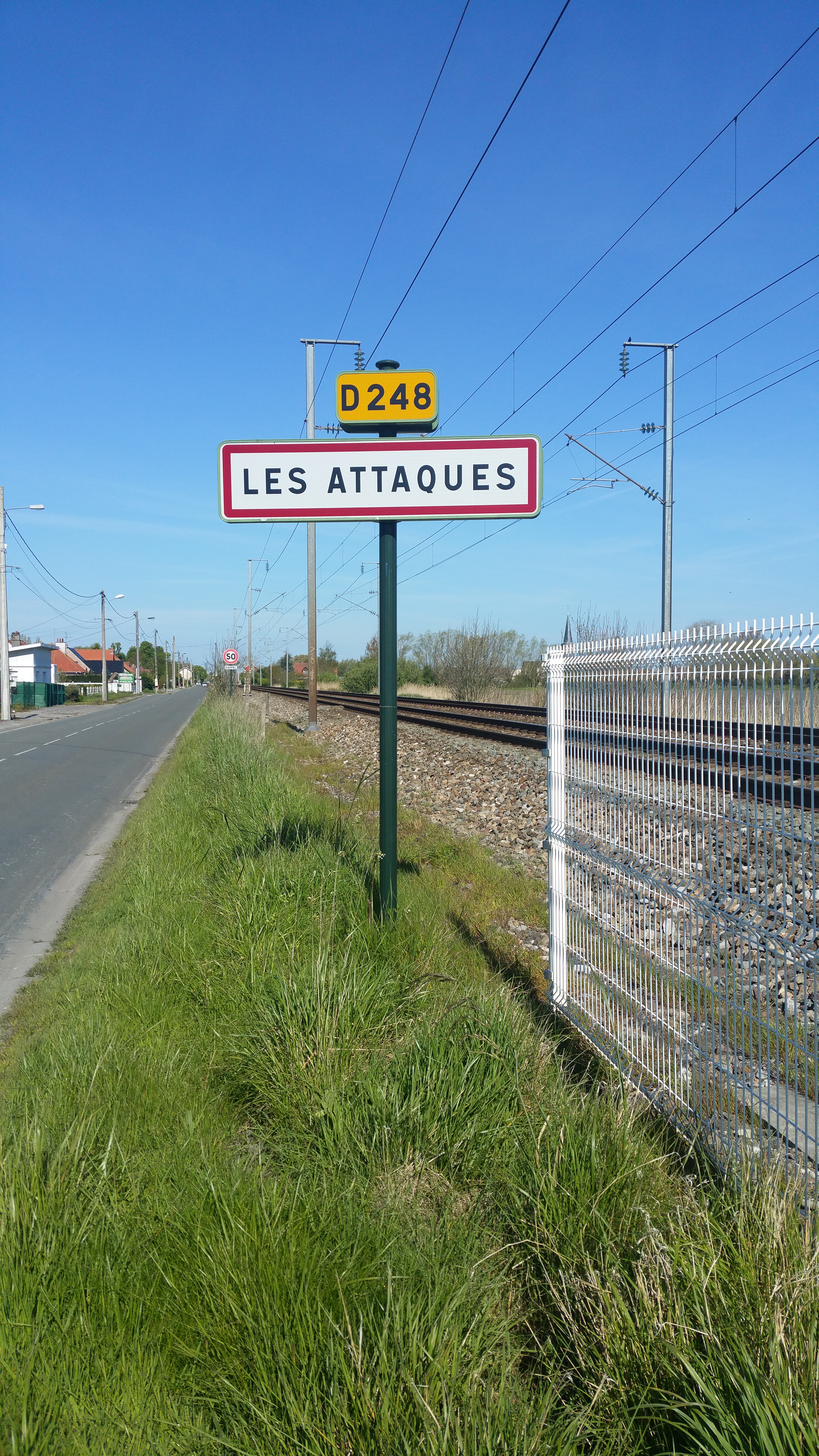 Vue d'une entrée de la commune de Les Attaques, près de la ligne de Lille aux Fontinettes.